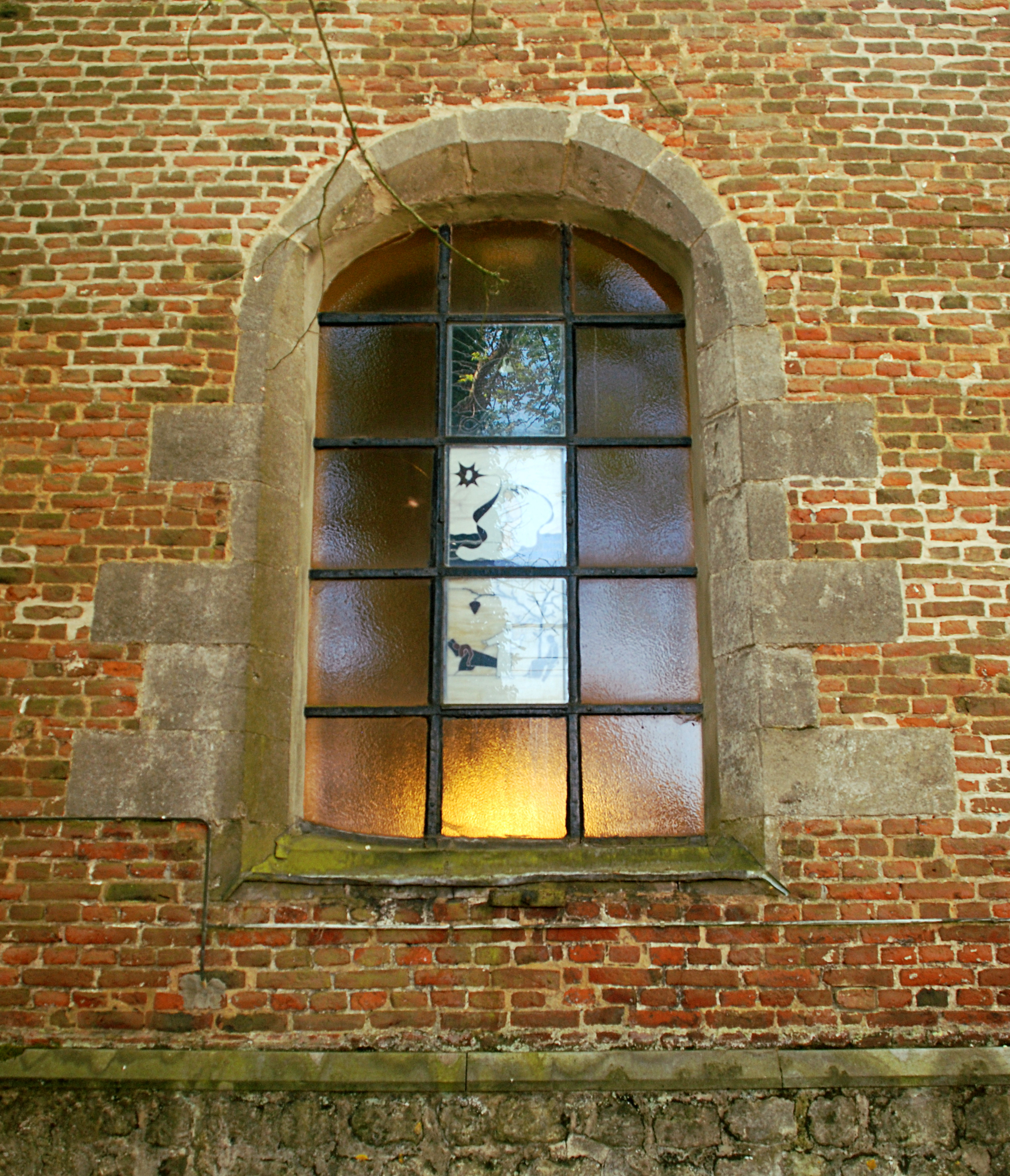 Belgique - Brabant wallon - Genappe - Glabais - Église Saint-Pierre